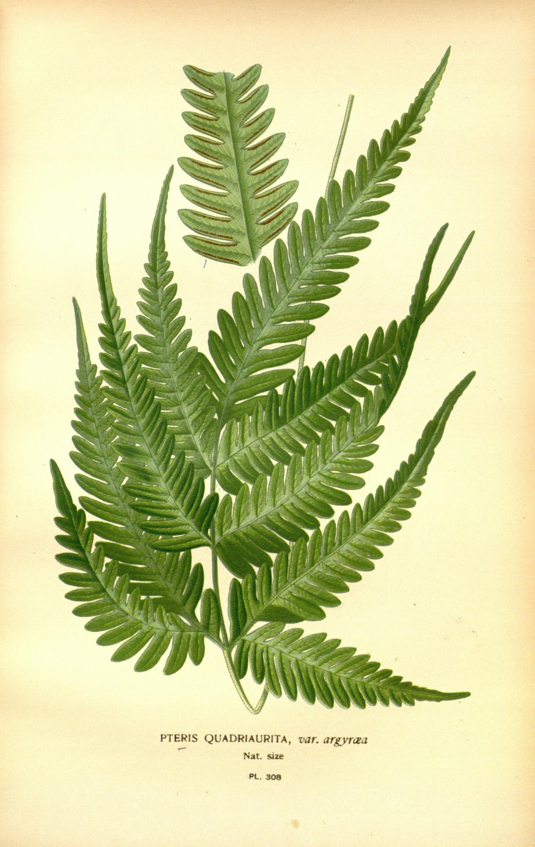 PTERis QUADRIAURITA, var. argyraa